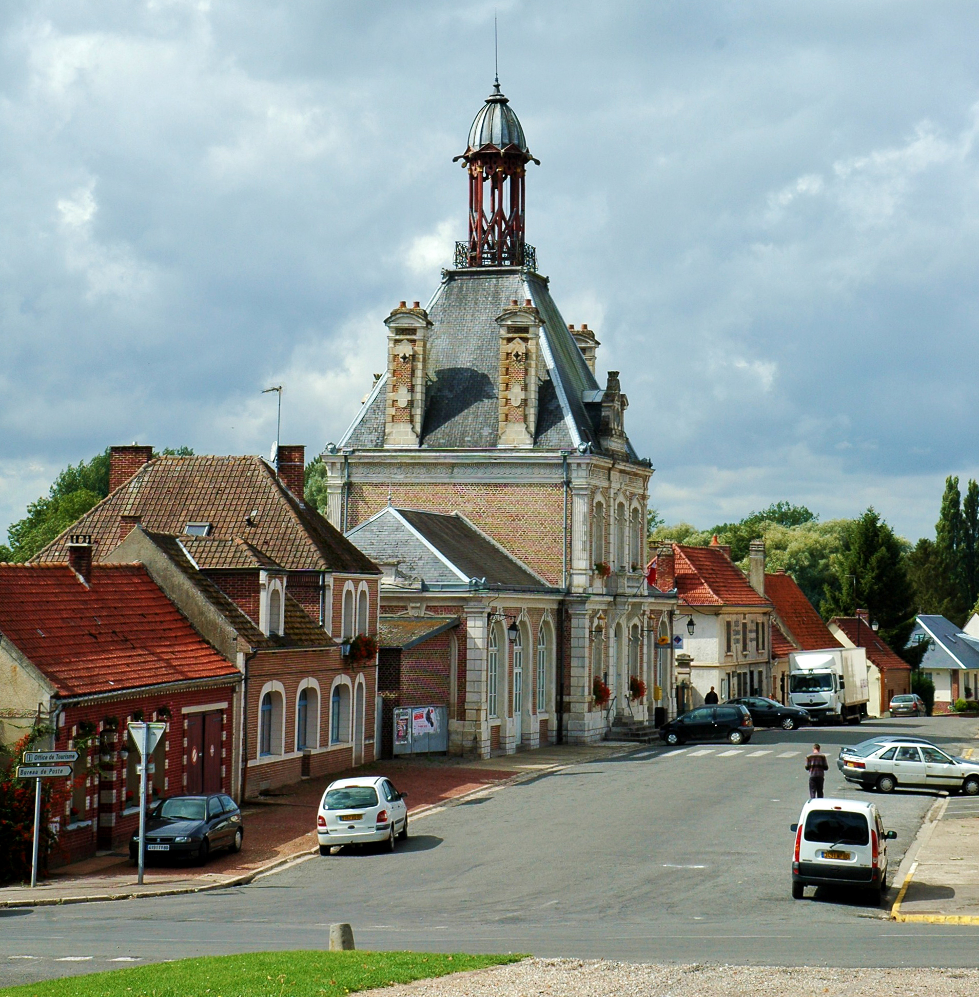 Long (Somme, France). La place centrale et l'hôtel-de-ville, vus depuis la petite esplanade du château.